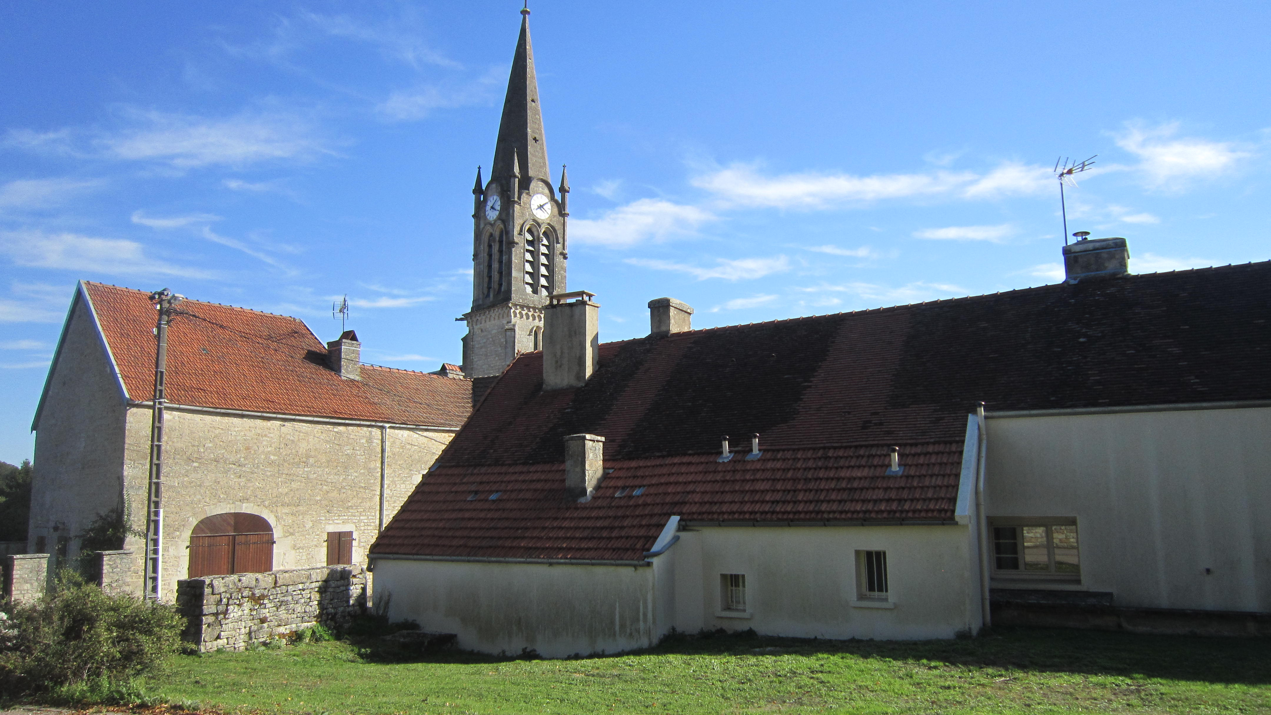 Buxerolles (Côte-d'Or)